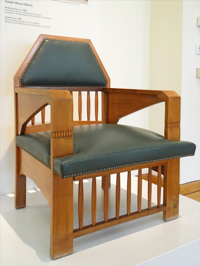 "Fauteuil jugendstil conçu par Joseph Maria Olbrich" 1900 noyer, cuir vert (le modèle exposé a été rénové) fabriqué par Hofmöbelfabrik Julius Glückert, Darmstadt Musée de la colonie d'artistes de Darmstadt Site officiel de la Mathildenhöhe